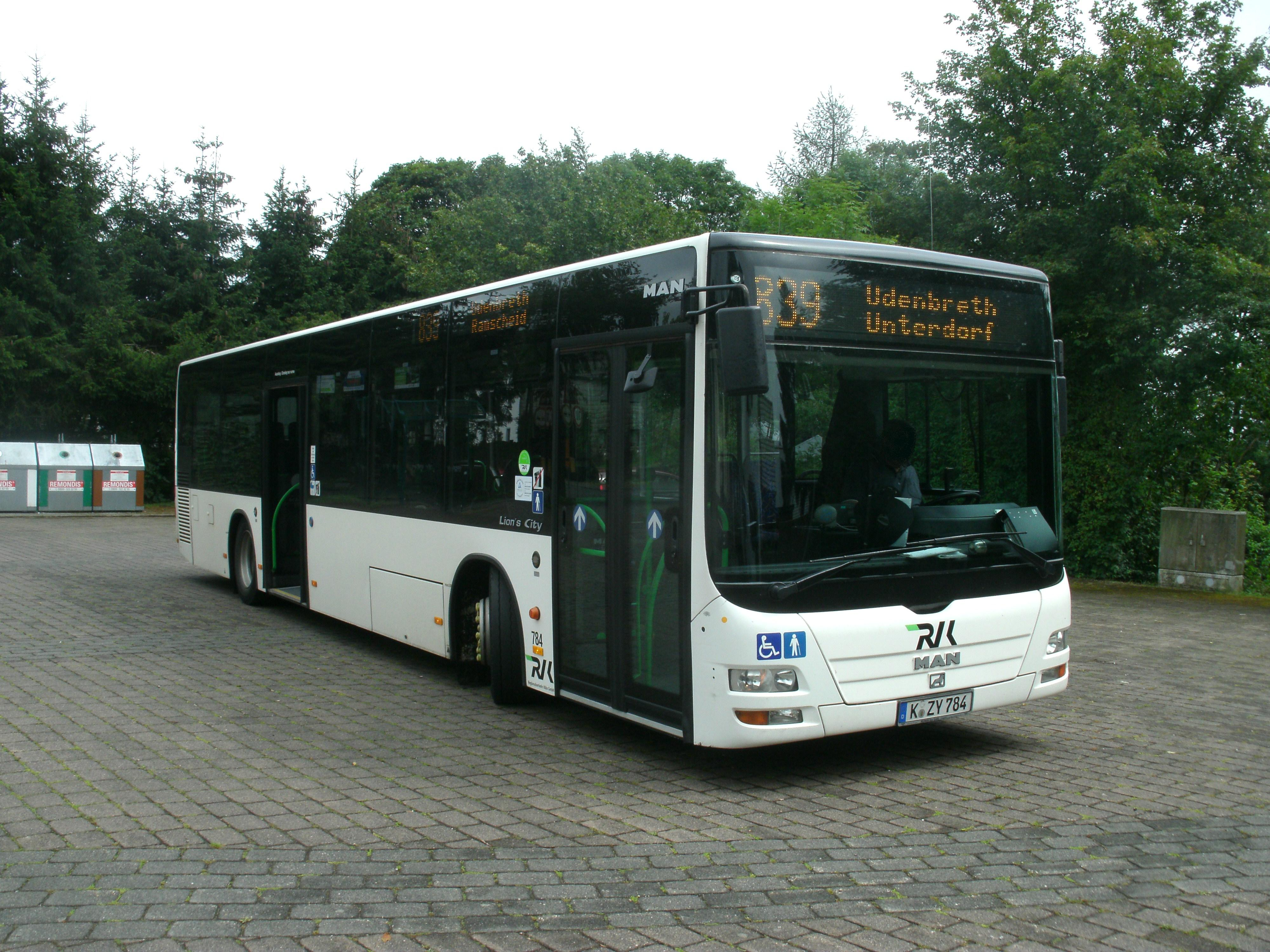 Linienbus der Regionalverkehr Köln (RVK) als Linie 839 in Udenbreth an der Endhaltestelle Udenbreth Unterdorf